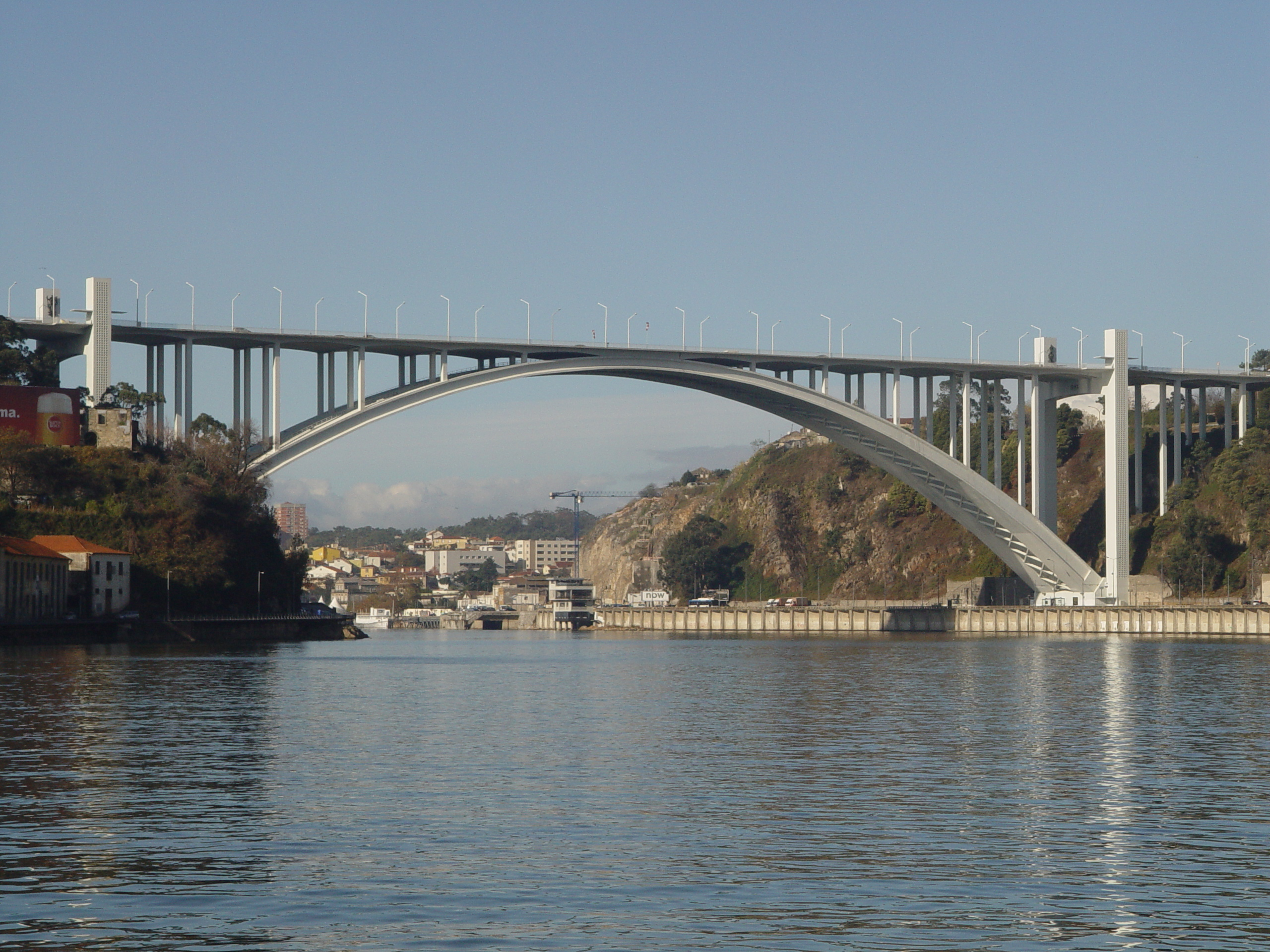 Arrabida Bridge in Porto Portugal